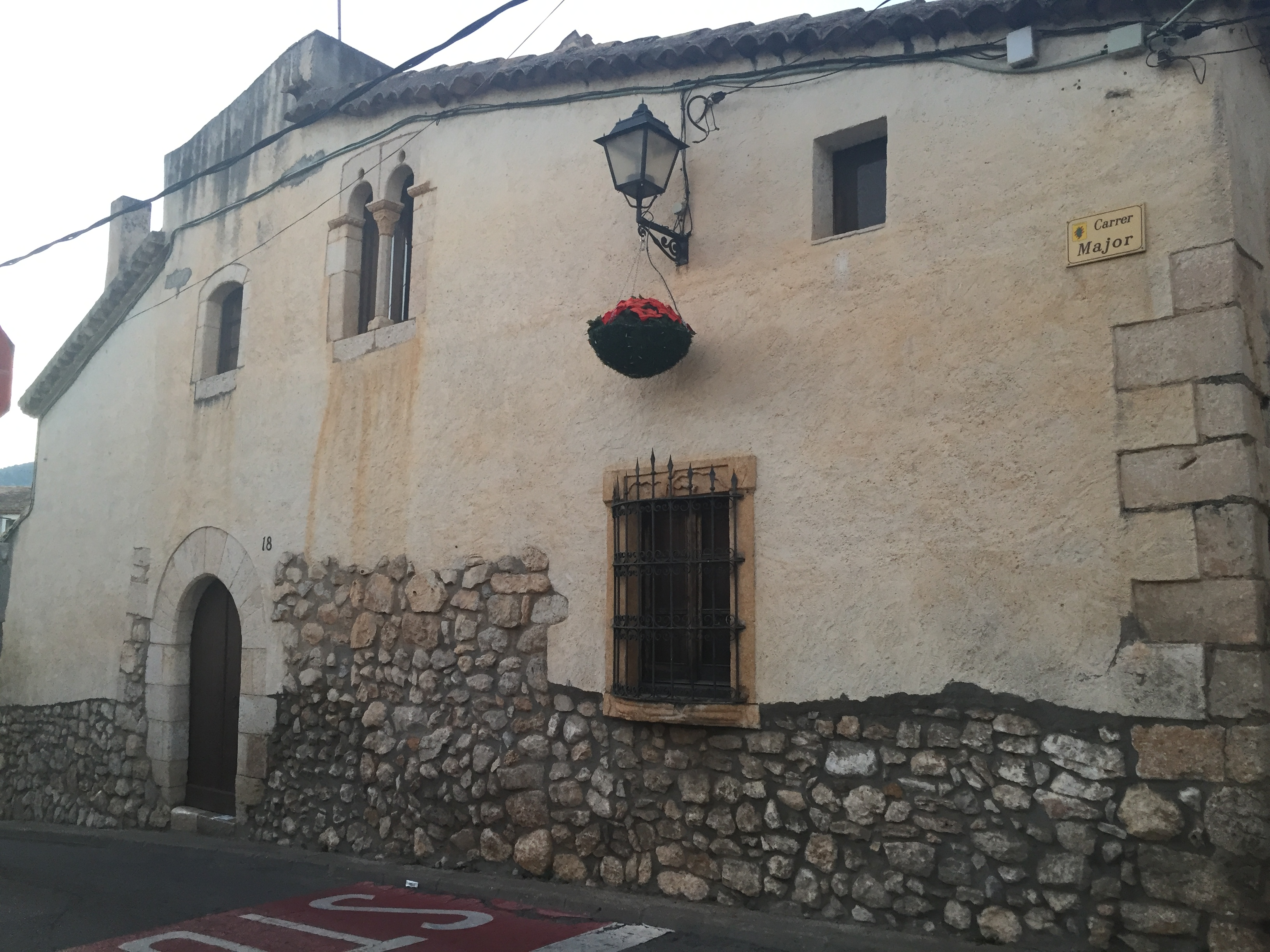 Can Saba (Canyelles)